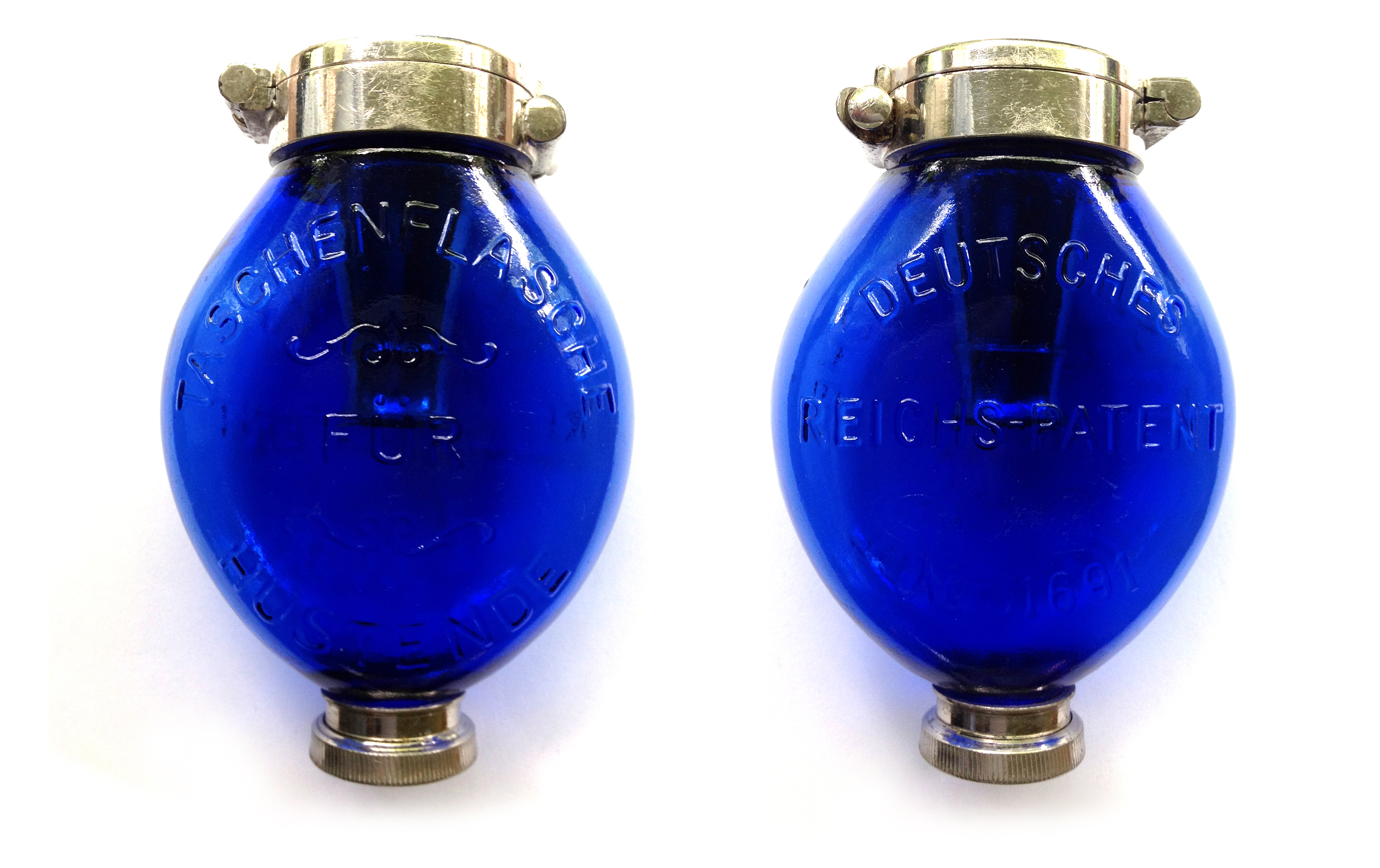 Erste Taschenflasche für Hustende von 1889. Design: Geheimrath Dr. Peter Dettweiler